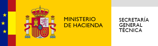 Logotipo de la Secretaría General Técnica del Ministerio de Hacienda de España